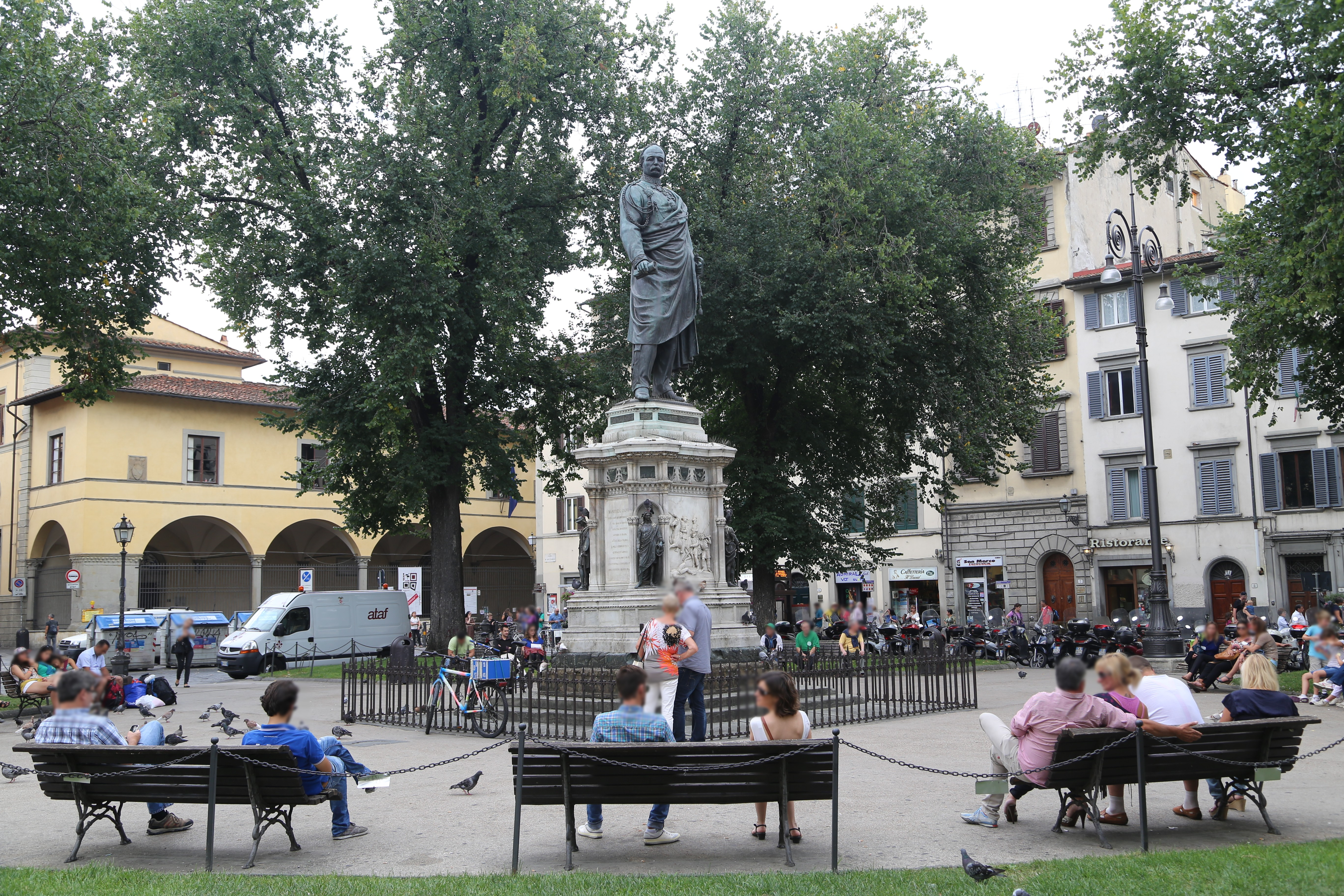 Monument Manfredo Fanti, Piazza San Marco, Florenz